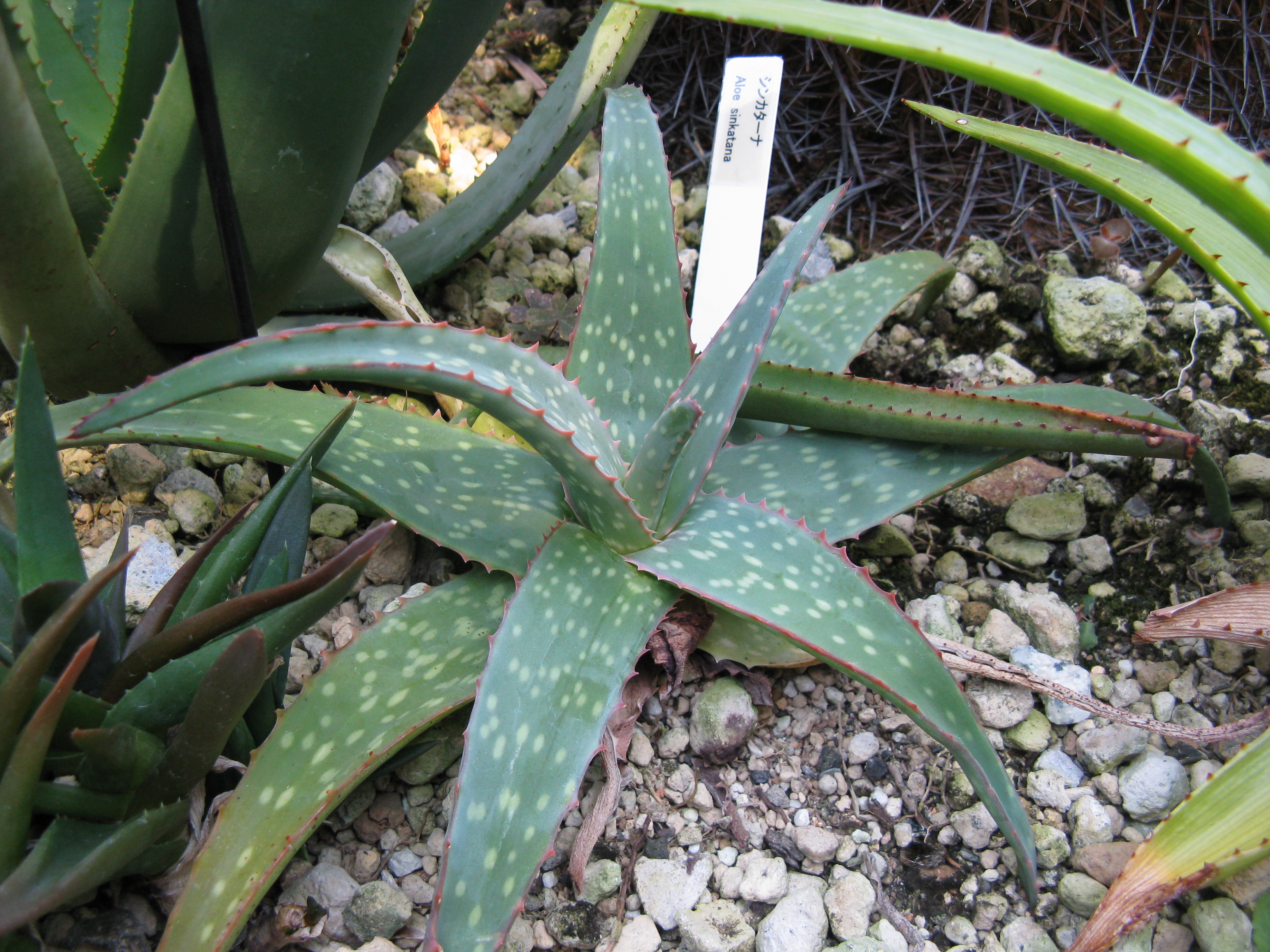 Aloe sinkatana Place:Osaka Prefectural Flower Garden,Osaka,Japan